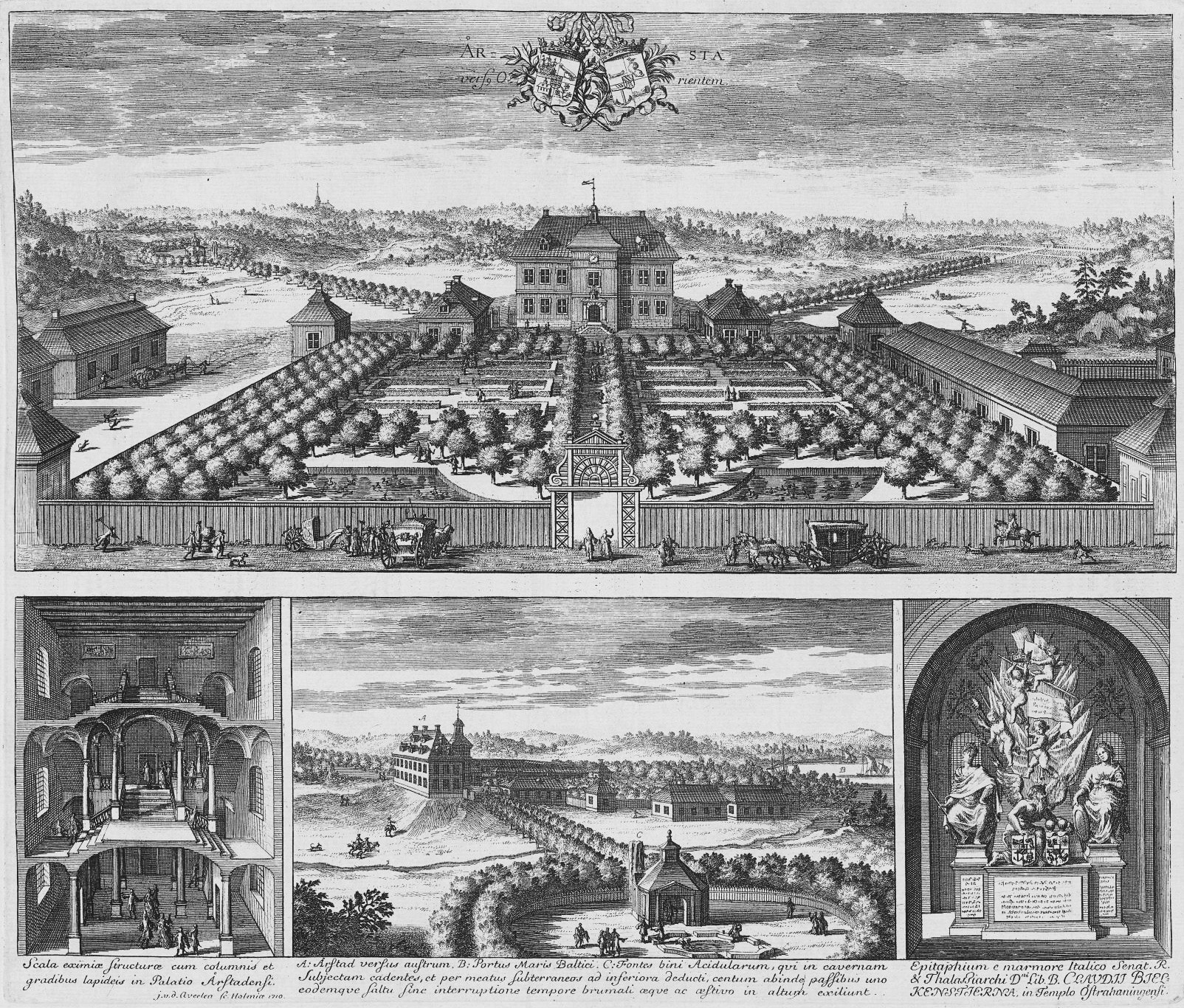 Åhrsta versus Orientem j. v. d. Aveelen Sc. Aveelen, Johannes van den, 1655-1727 (Gravör) Dahlbergh, Erik, 1625-1703 (Kommissarie)